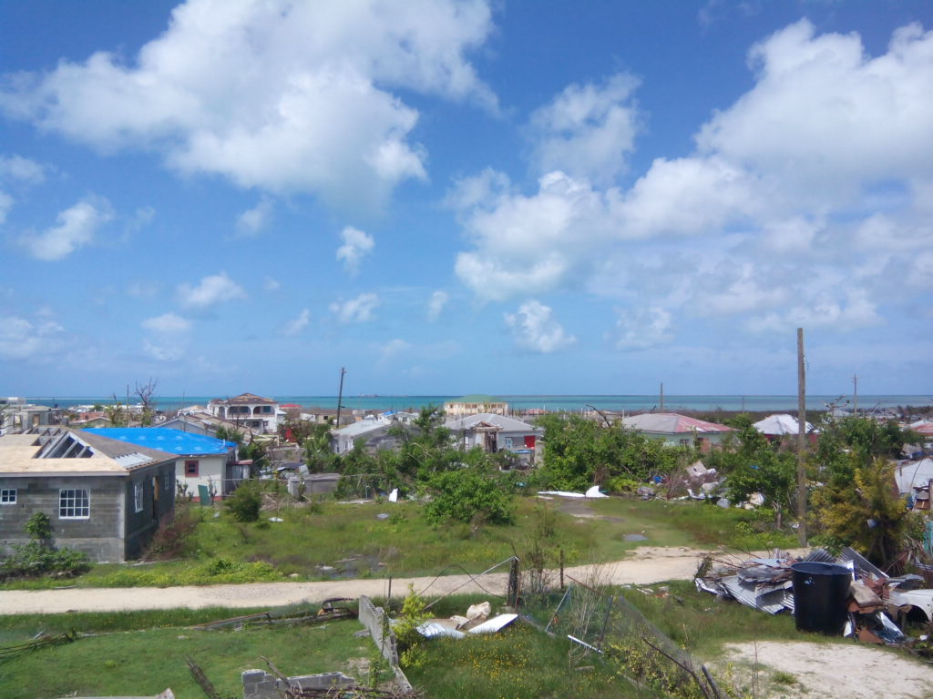 Badai Irma yang melanda Barbuda menghancurkan 95% dari infrastruktur yang ada